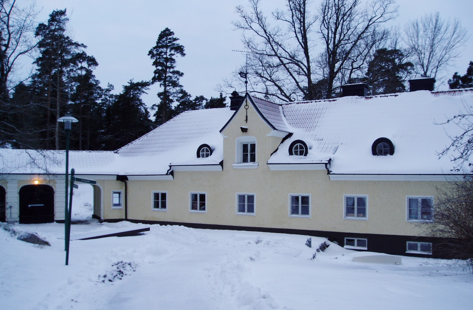 Stallet vid Graninge stiftsgård